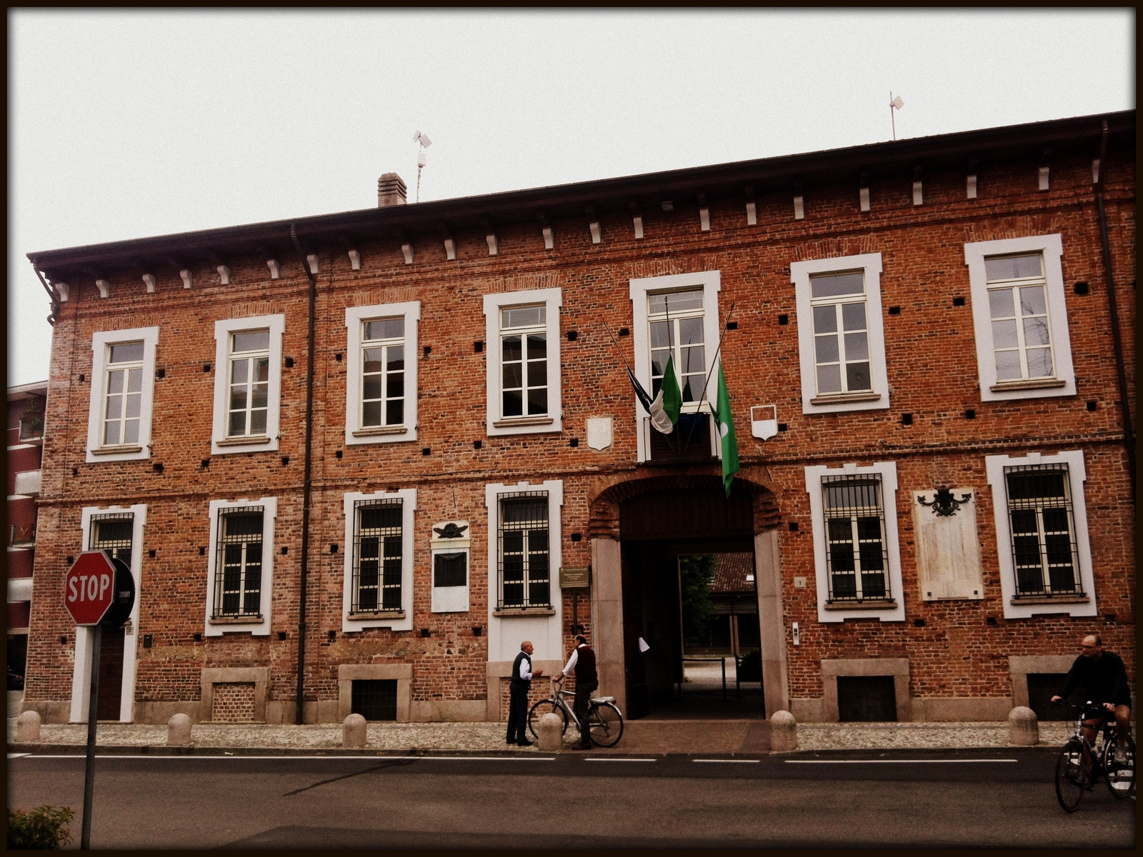 Busto Garolfo - Palazzo Molteni